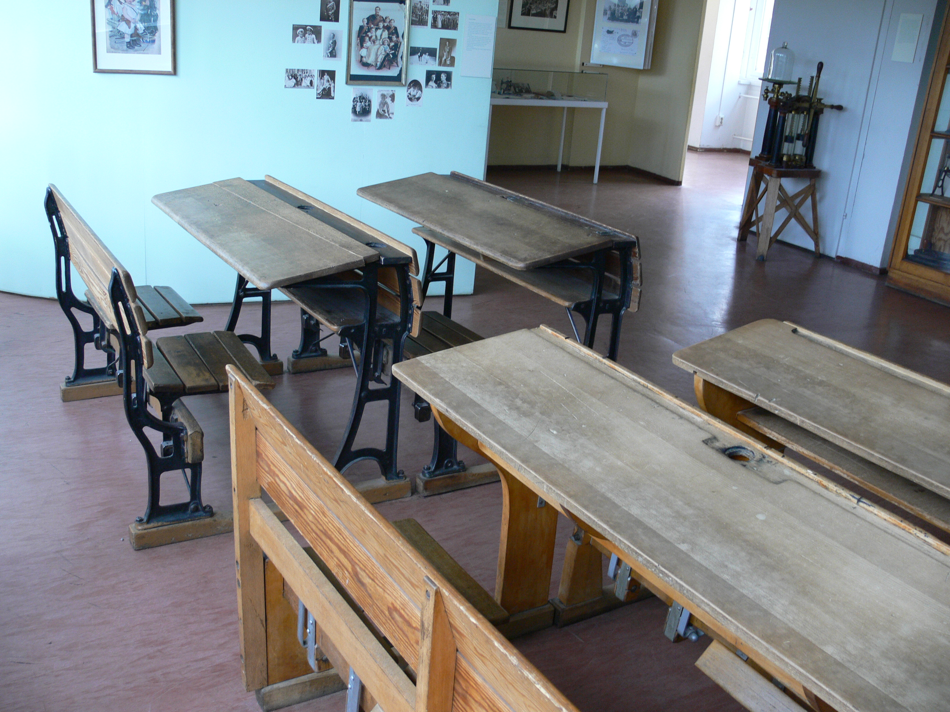 Sammlung Kindheit und Jugend (Stiftung Stadtmuseum Berlin) Klassenzimmer